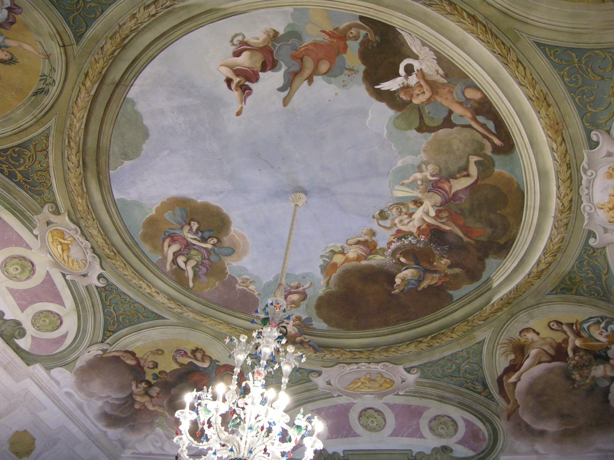 Villa manin, interno